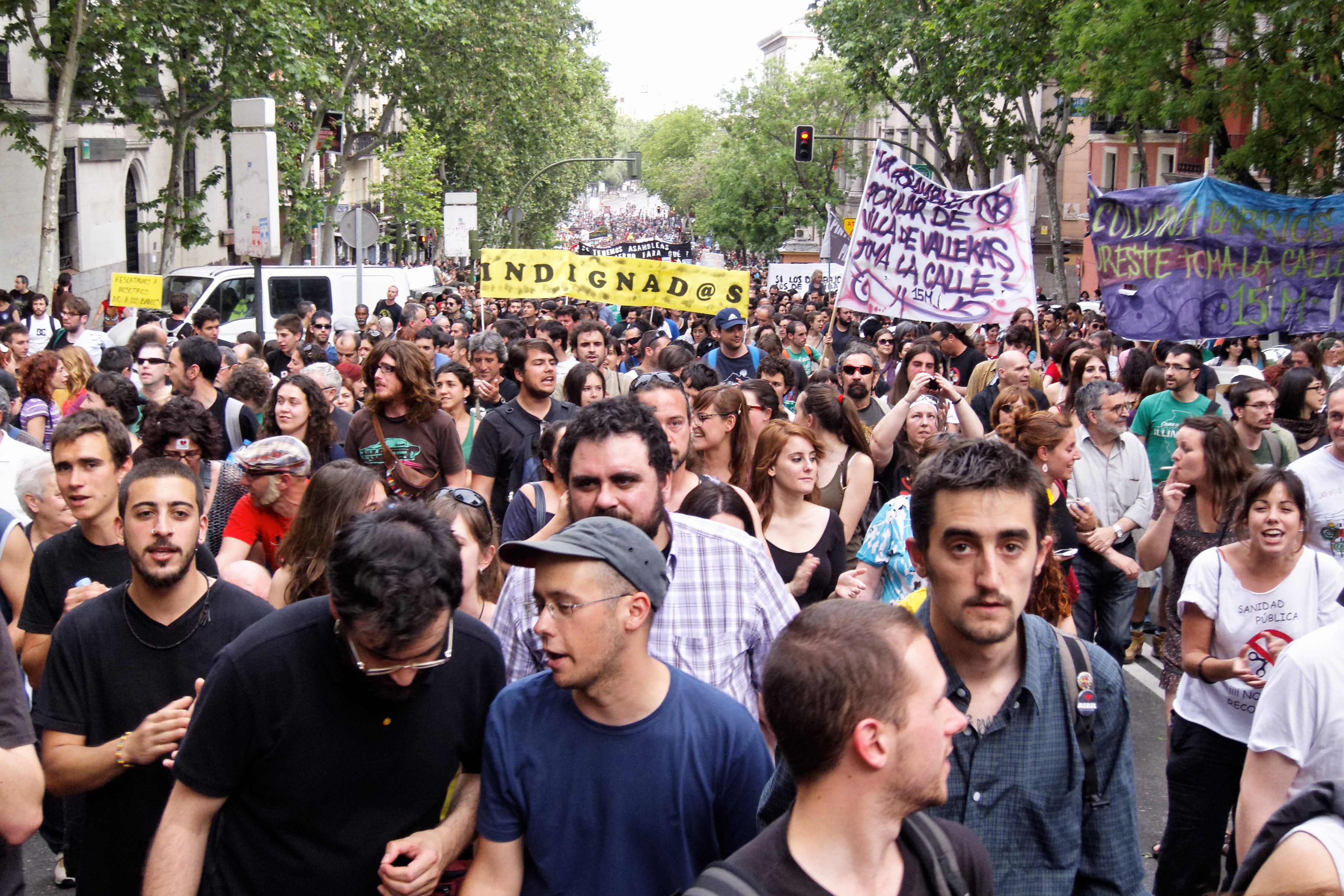 Manifestación del 12 de mayo de 2012 en Madrid dirigiéndose hacia Puerta del Sol por la calle de Atocha.